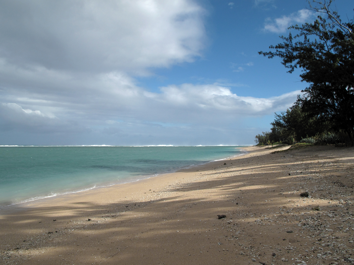 Vue du lagon de L'Ermitage au matin, à la Réunion.